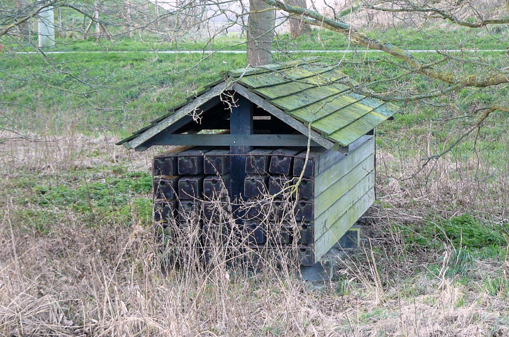 Bij de damsluis staat dit schotbalkhuisje met de schotbalken om de damsluis af te sluiten.